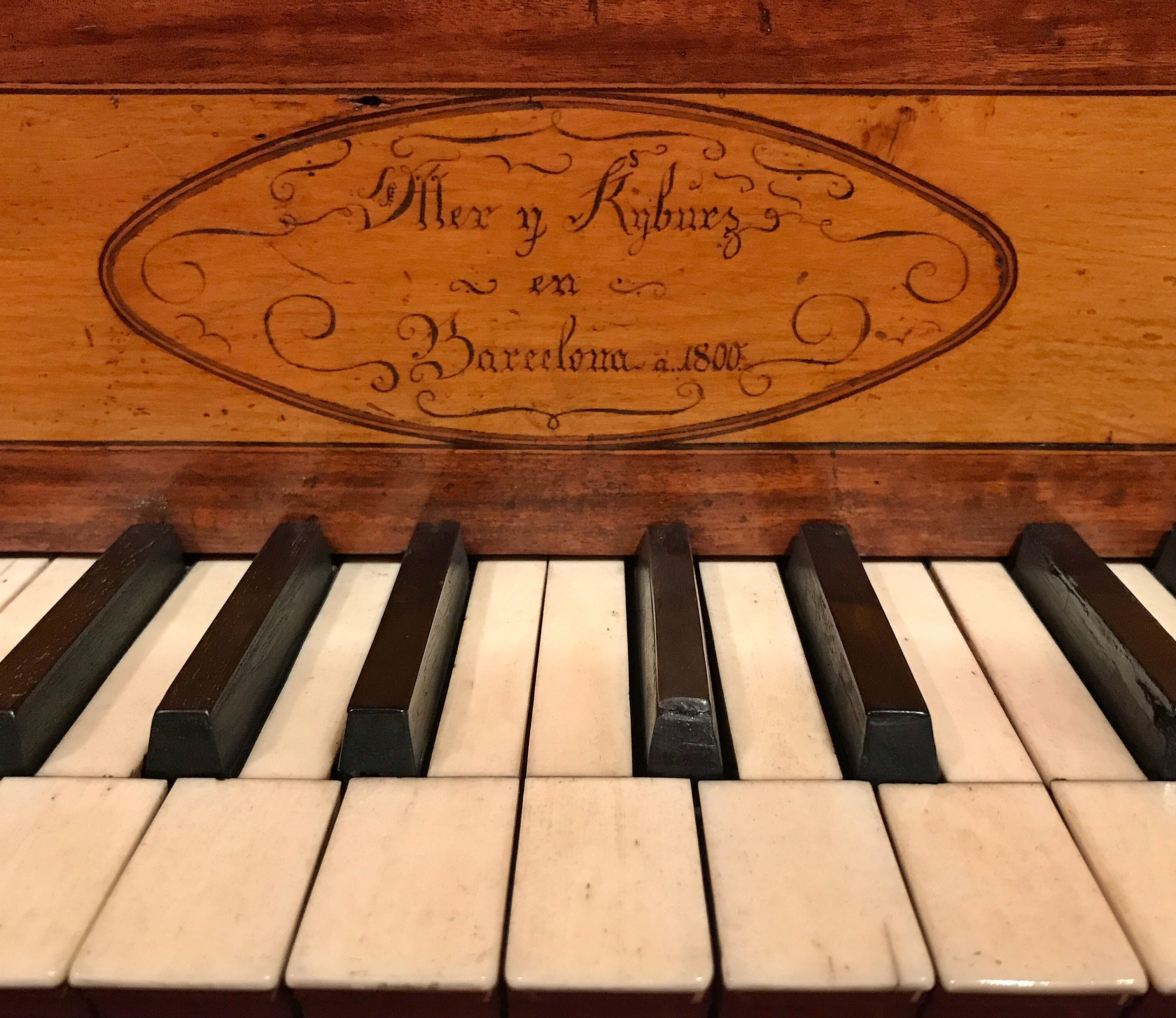 Piano de taula construït per Johannes Kyburz i Joseph Franz Otter el 1800, al fons del Museu de la Música de Barcelona. Detall de la signatura a la part frontal del piano.